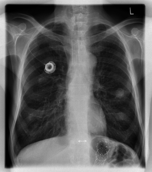 Röntgen Thorax mit Portkatheter bei Krebspatienten